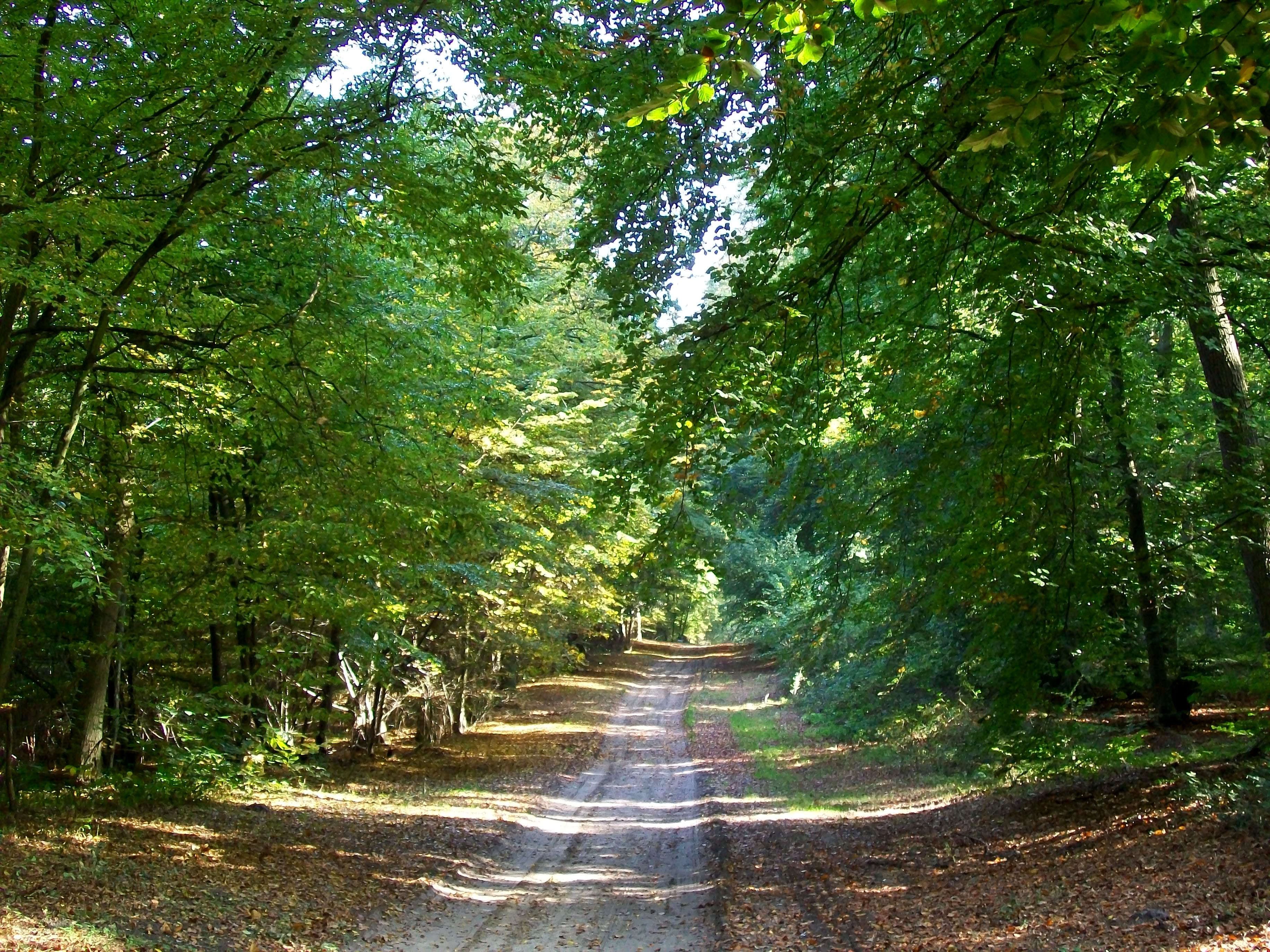 La route des Bâtis dans la forêt d'Halatte, commune de Verneuil-en-Halatte.